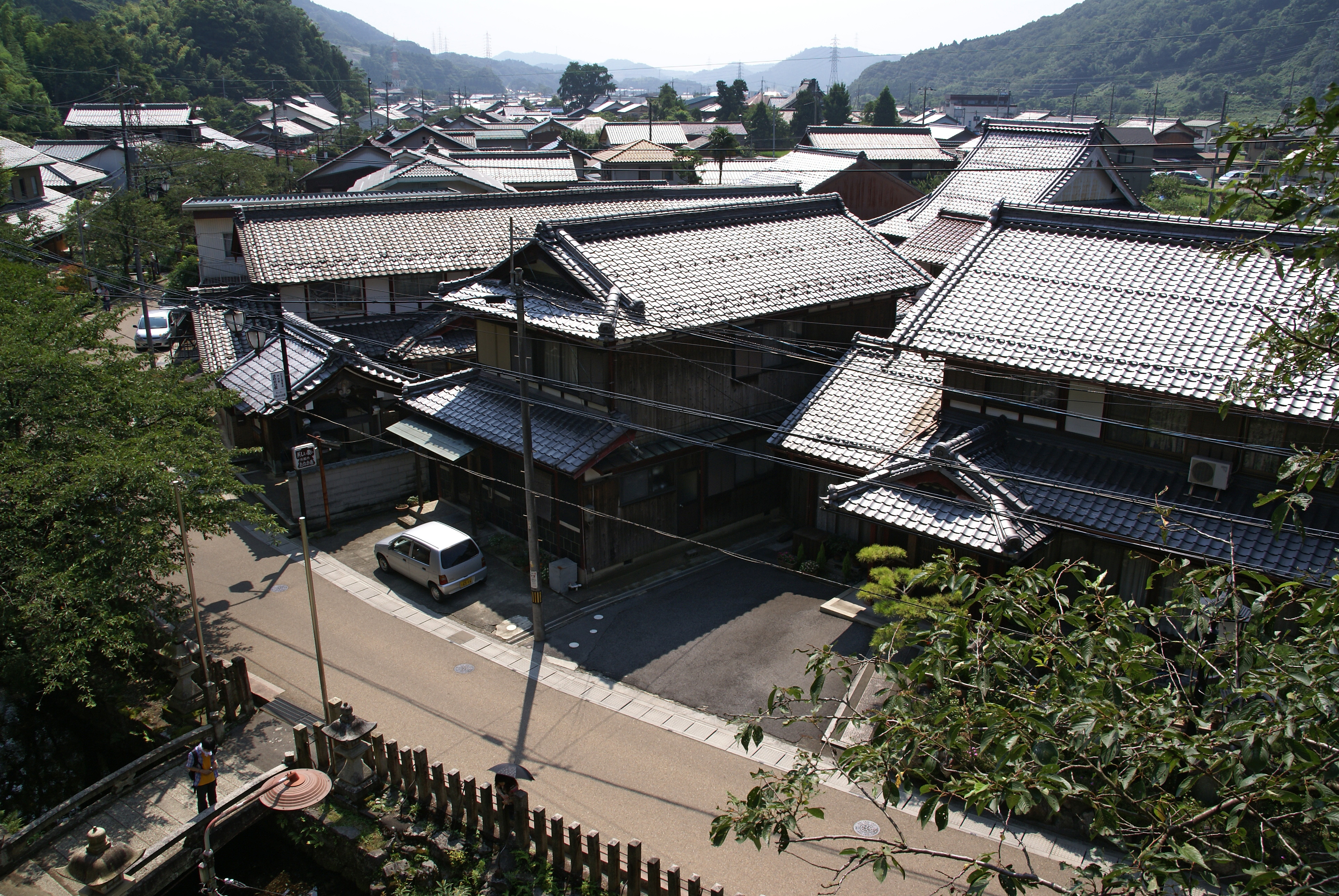 Samegai-juku in Maibara, Shiga prefecture, Japan